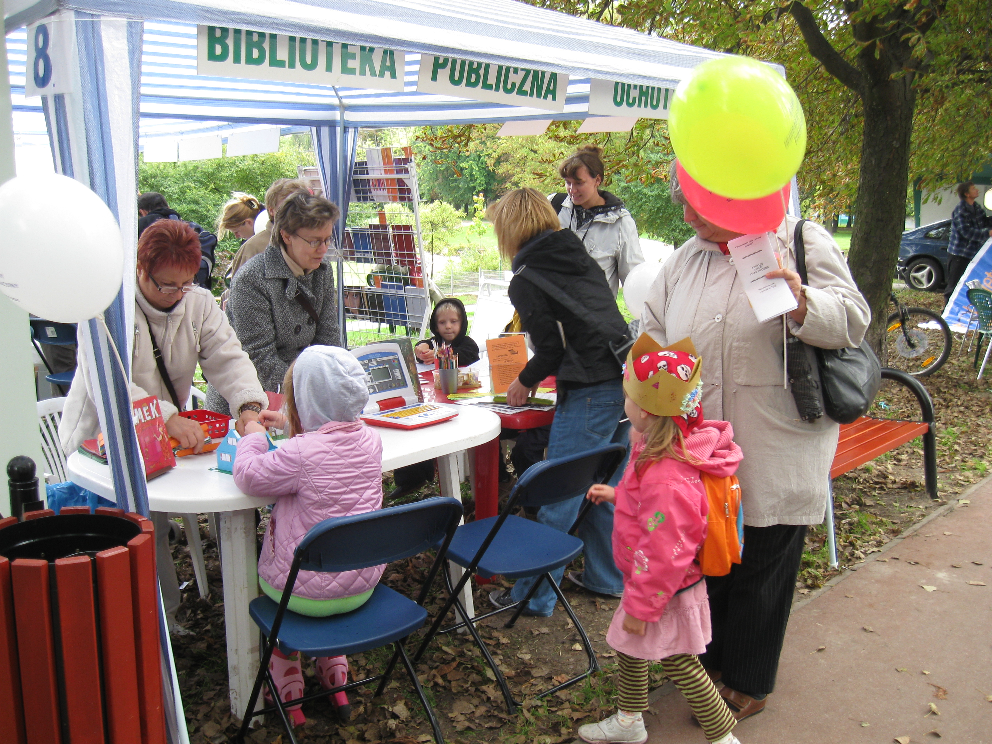 Stoisko biblioteki na Pikniku Integracyjnym w Parku Szcęśliwickim